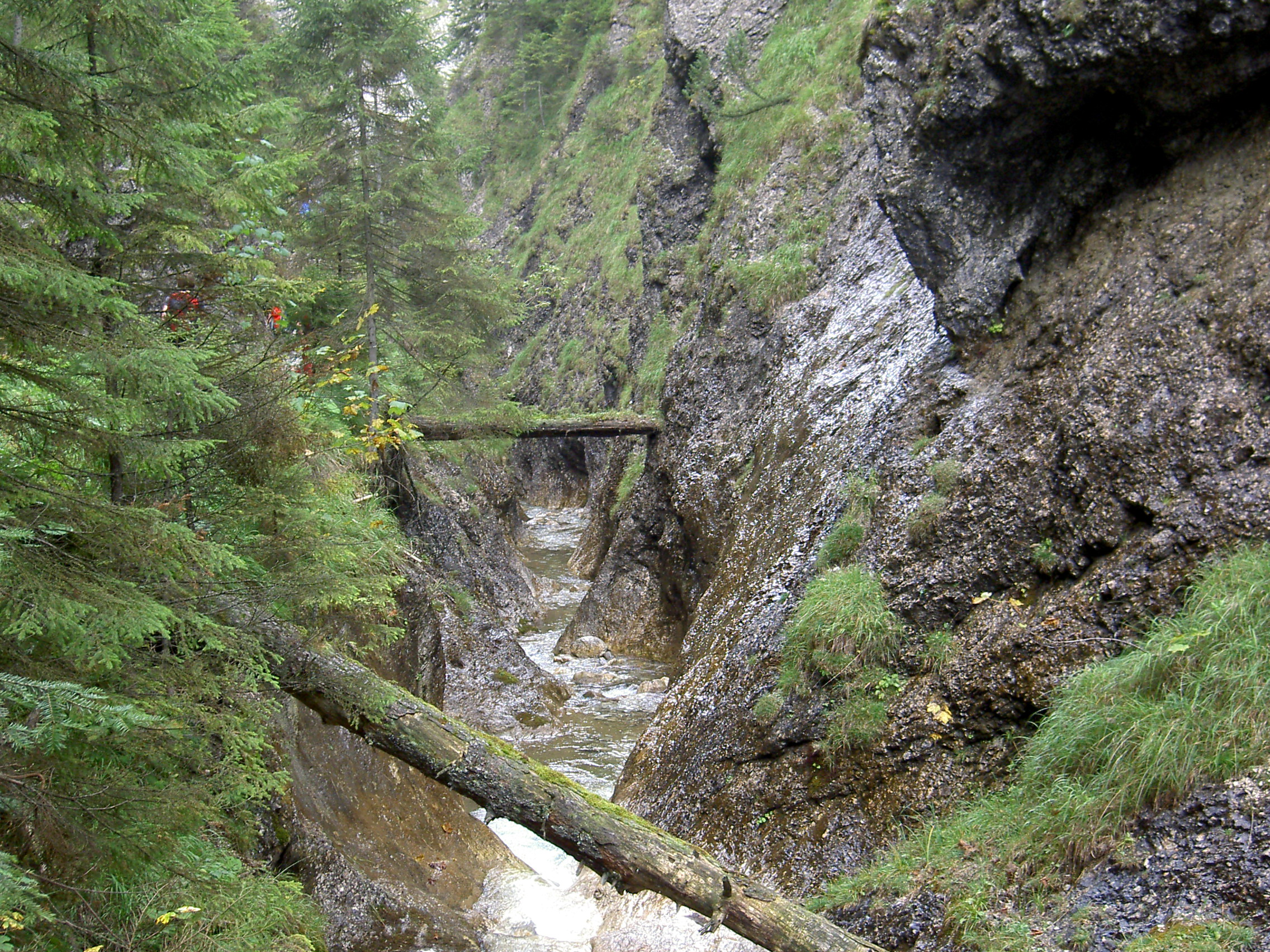 Juráňová dolina